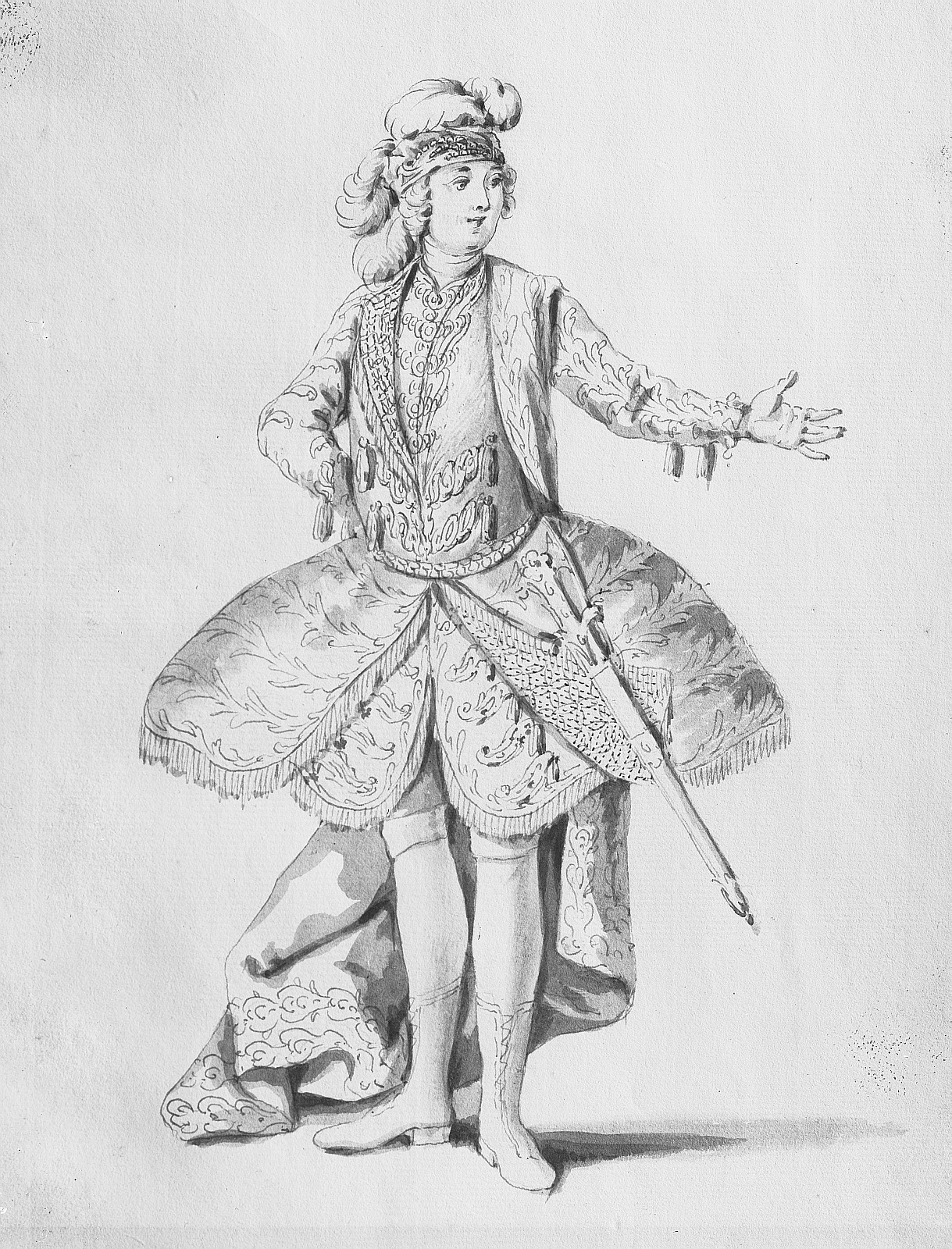 Domenico Annibali als Plistene in "Ipermestra" von Johann Adolph Hasse. Hoftheater Dresden, Uraufführung in Hubertusburg, 7. Oktober 1751. Kostümbildner: Servandoni Federzeichnung von Francesco Ponte in: Vestiarium der Oper "Ipermestra". Dresden: Kupferstich-Kabinett Ca 104 Blatt 4